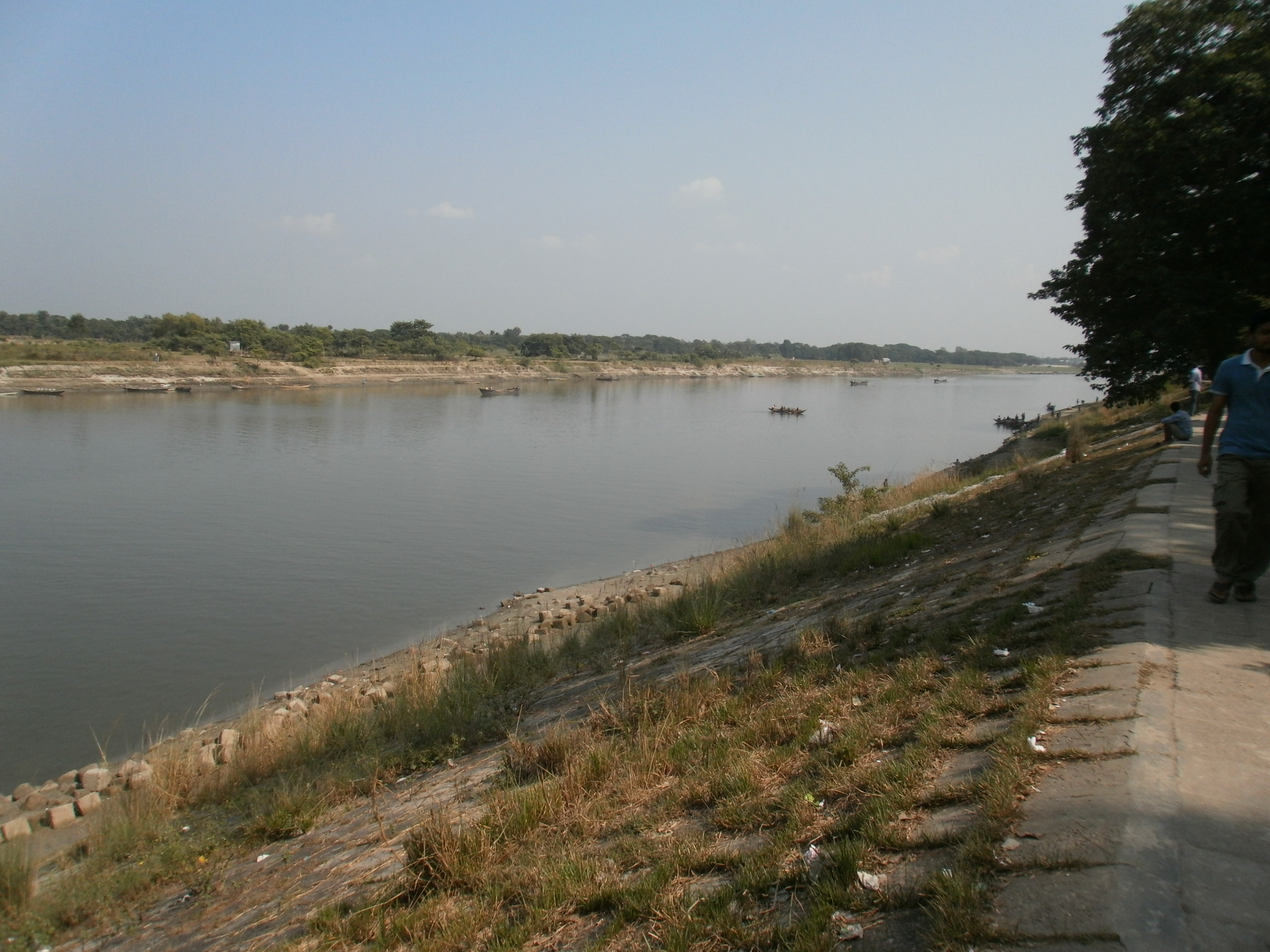 ময়মনসিংহ শহর ঘেঁষে প্রবহমান ব্রহ্মপুত্র নদ, ২০১১